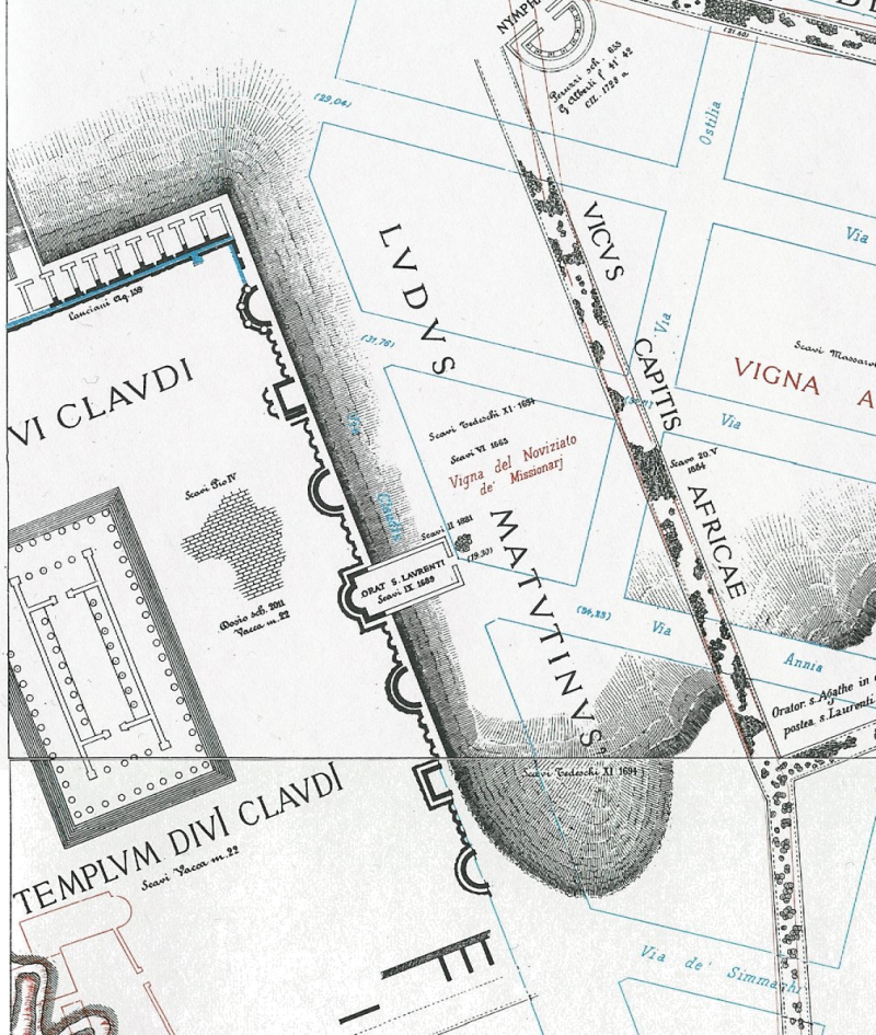 Rodolfo Lanciani, Forma Urbis Romae, Milano (1893-1901); collage di estratti dalle Tavole XXX e XXXVI raffiguranti il Ninfeo di Nerone Categoria:Geografia dell'antica Roma